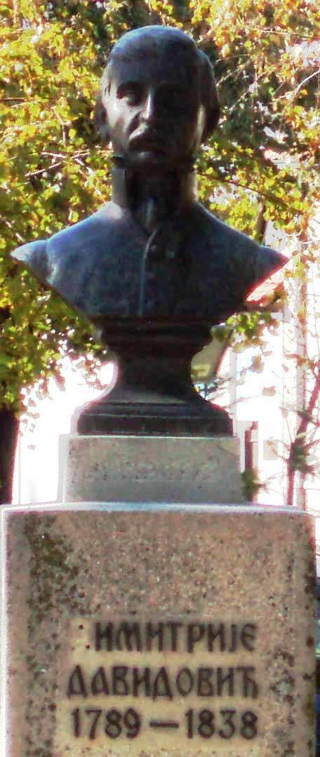 Spomenik D.Davidoviću u Zemunu na keju, autor fotografije: Nicolo